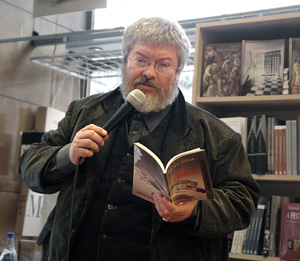 Szőcs Géza (Budapest, Írók Könyvesboltja)